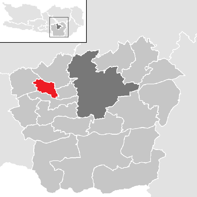 Bezirk Klagenfurt-Land